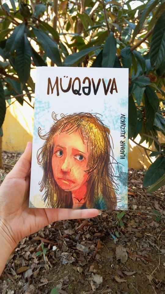 Xəyalə Muradın Müqəvva əsərinin Azərbaycan dilinə tərcüməsi